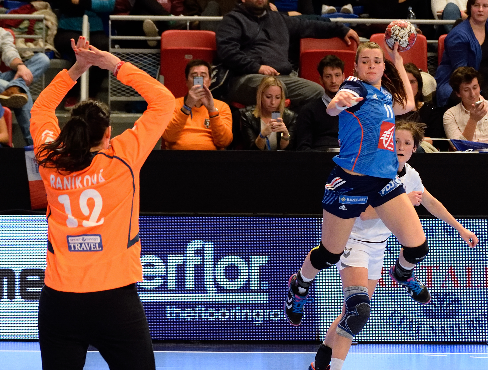 Marie Prouvensier ,le 29 novembre 2015, lors du match France / République Tchèque pour le compte du TIPIFF 2015. Au stade Pierre de Coubertin à Paris.